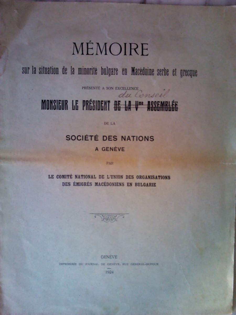 Mémoire sur la situation de la minorité bulgare en Macédoine serbe et grecque presenté a son excellence Monsieur le Président de la Vme Asemblée de la Société des Nations a Gèneve par le Comité National de l'Union des Organisations des Emigrés Macedoniens en Bulgarie. Gèneve, Imprimerie de Journal de Gèneve